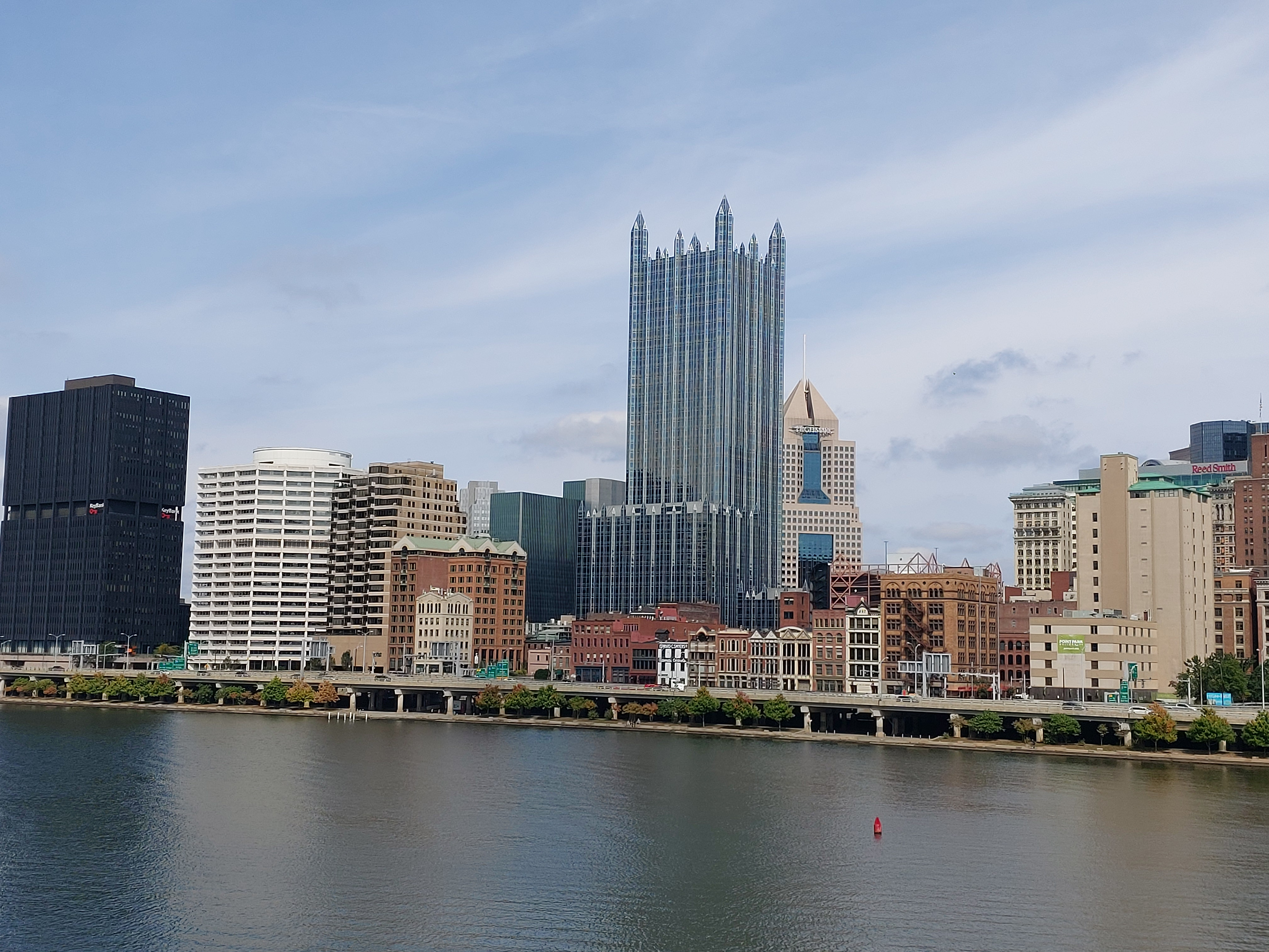 Licencija